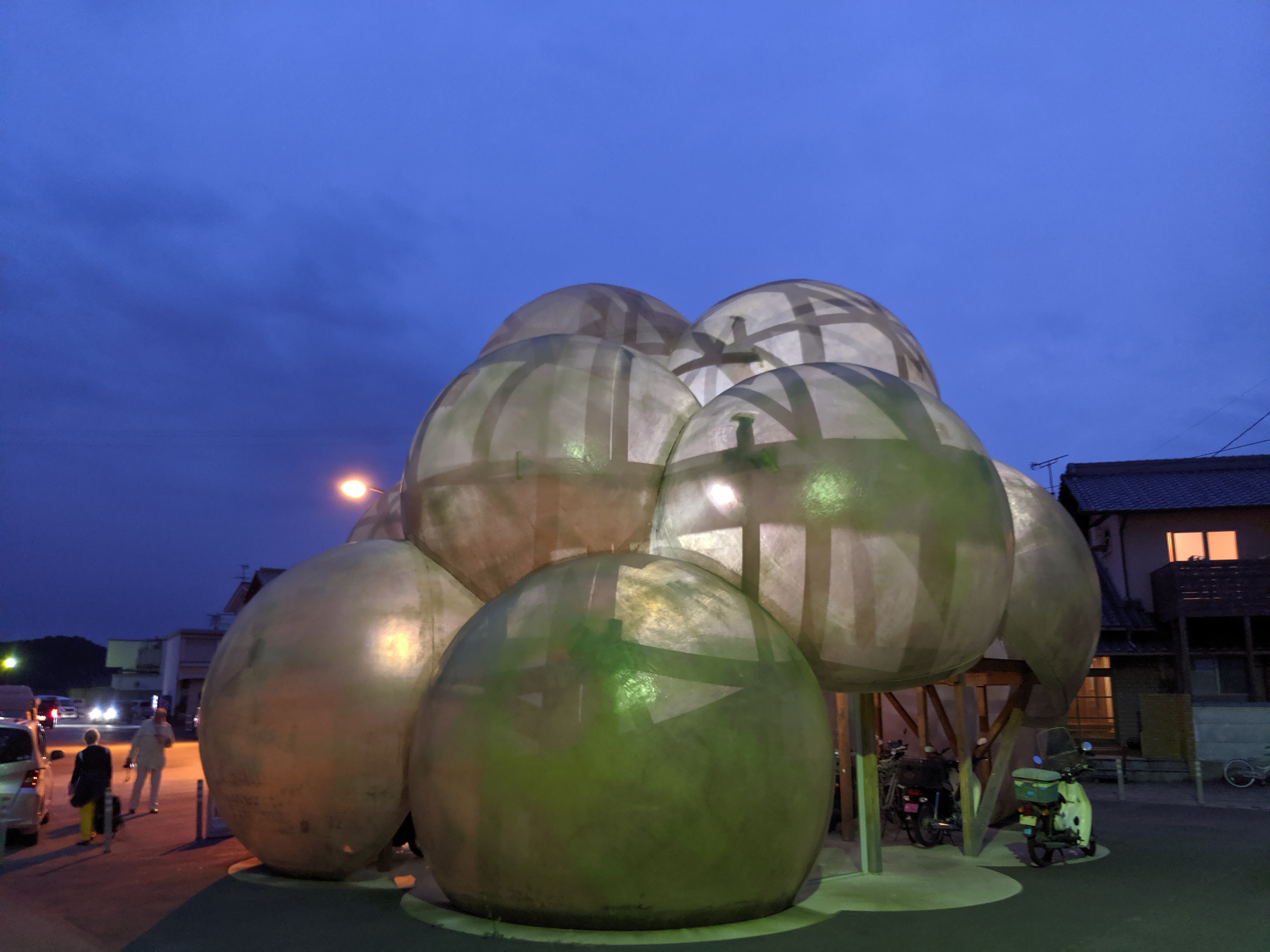 直島（本村）港ターミナル。駐輪場、待合室機能をもつ。